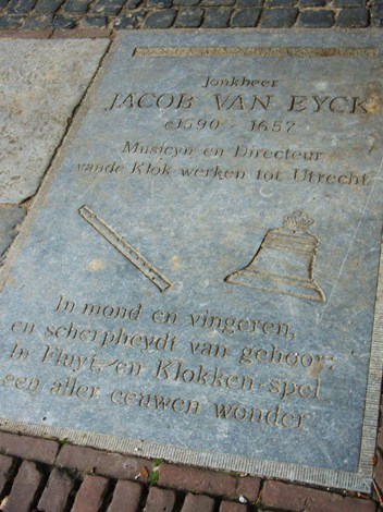 Stoeptegel ter ere van Jacob van Eyck, Utrecht